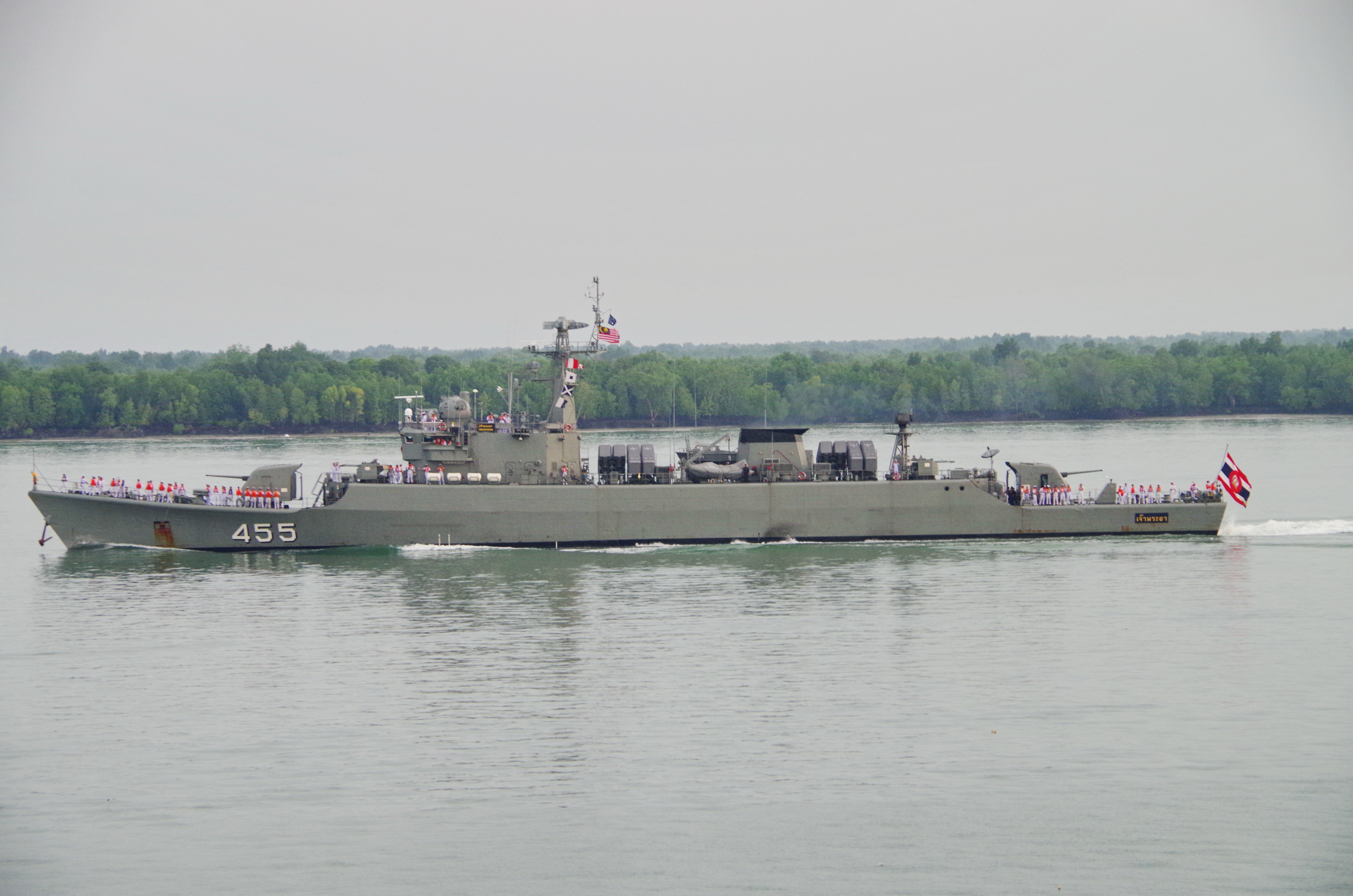 Schiff der Marine von Malaysia, Hafen von Port Klang